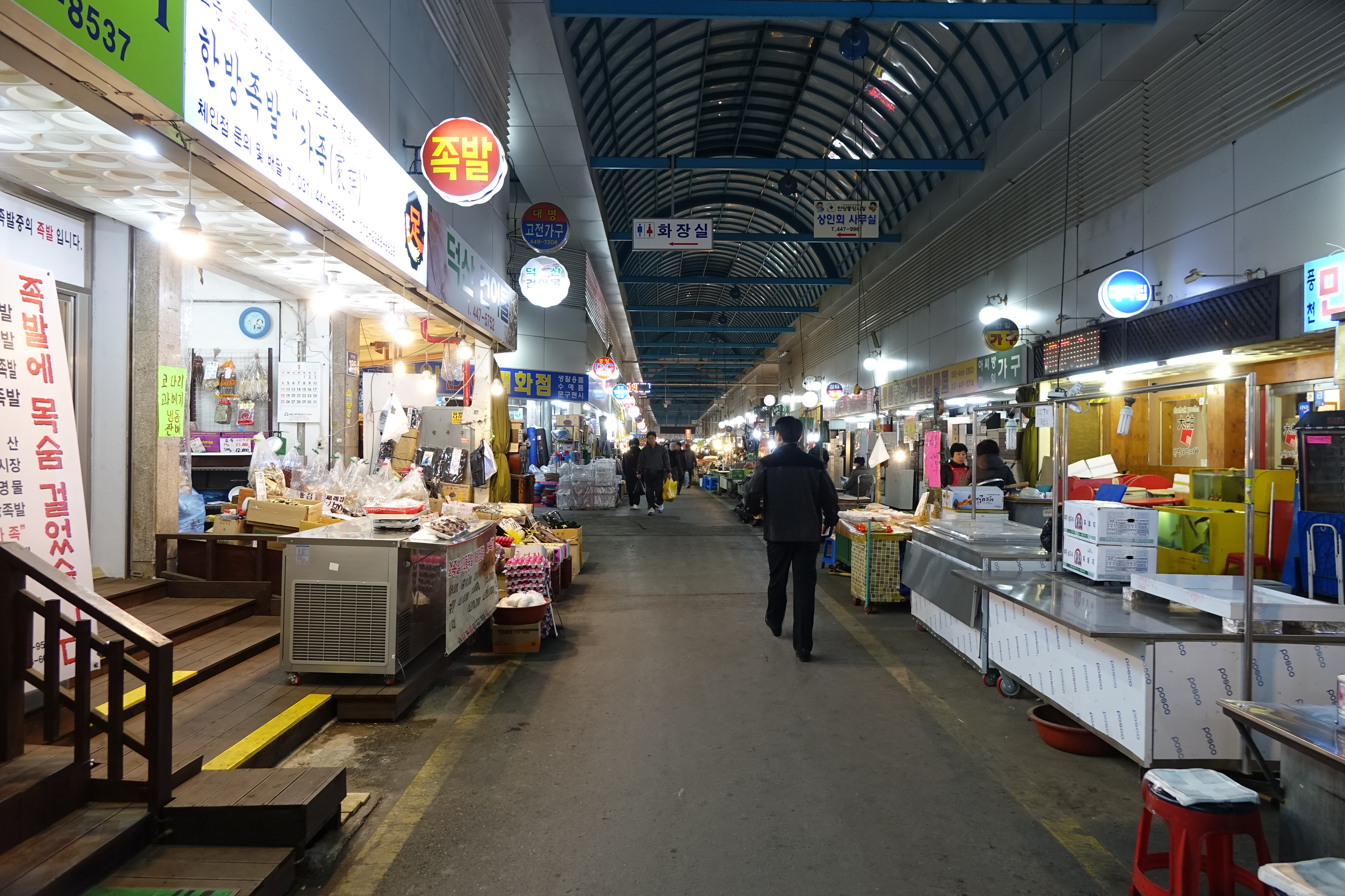 2015년 1월 27일 최광모 촬영